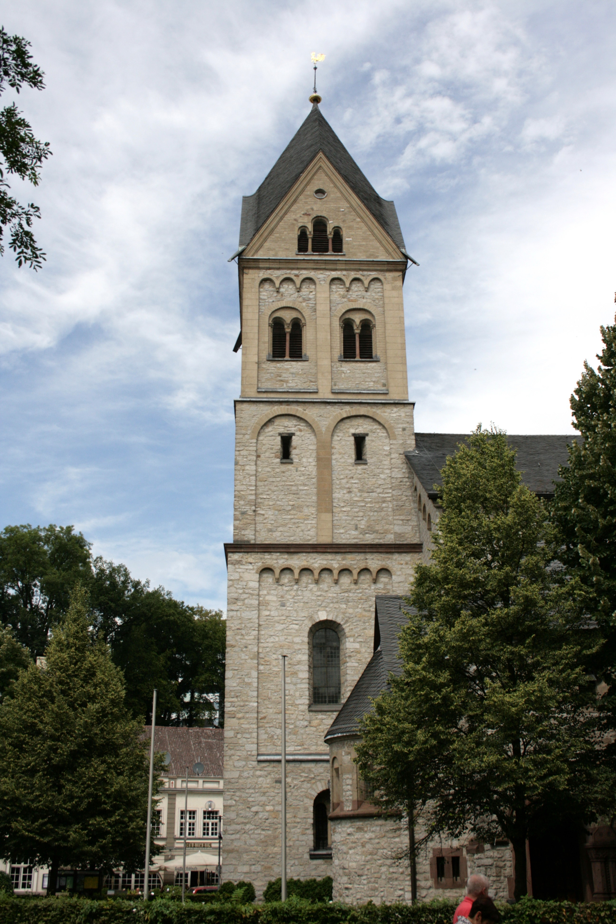 Sankt Laurentius am Konrad-Adenauer-Platz in Bergisch Gladbach